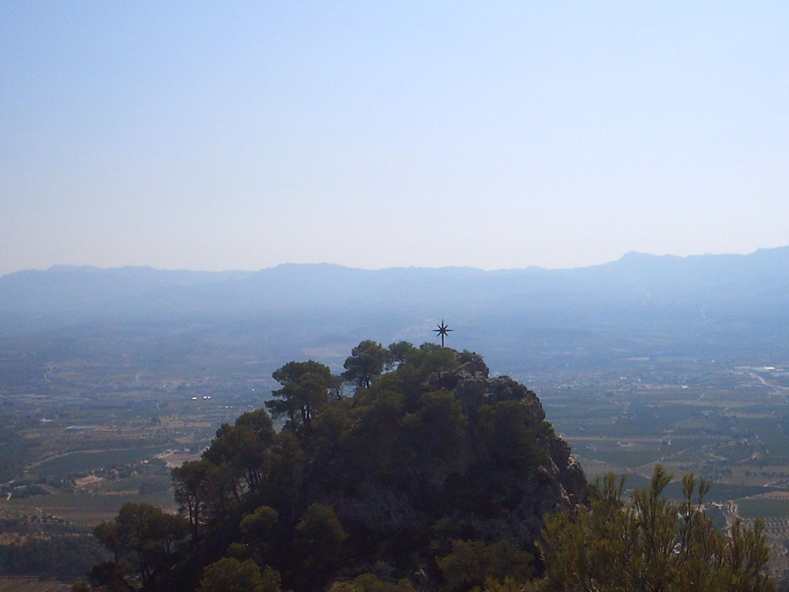 La Picossa, Mora d'Ebre